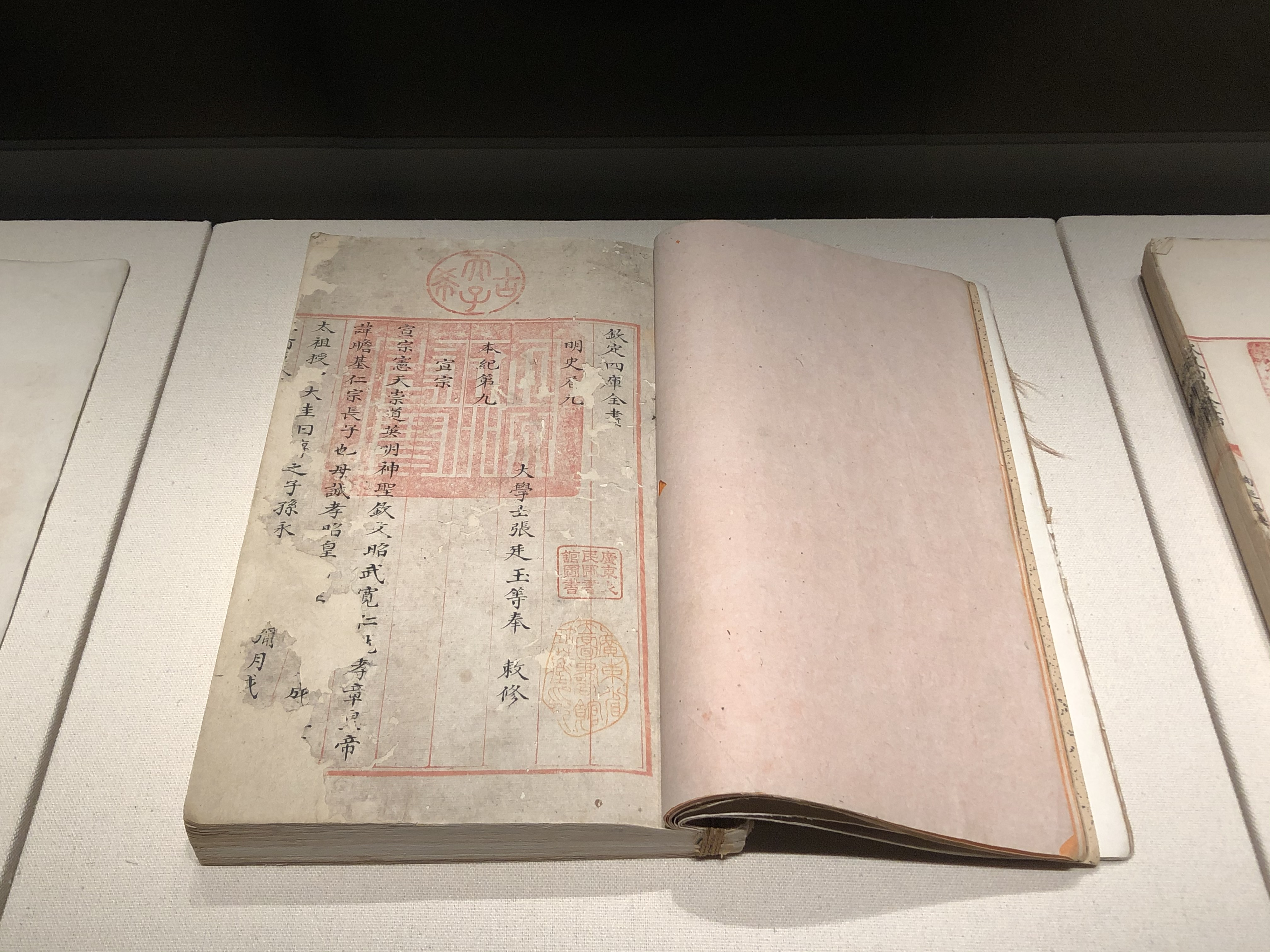 中文（台灣）: 文源閣四庫全書